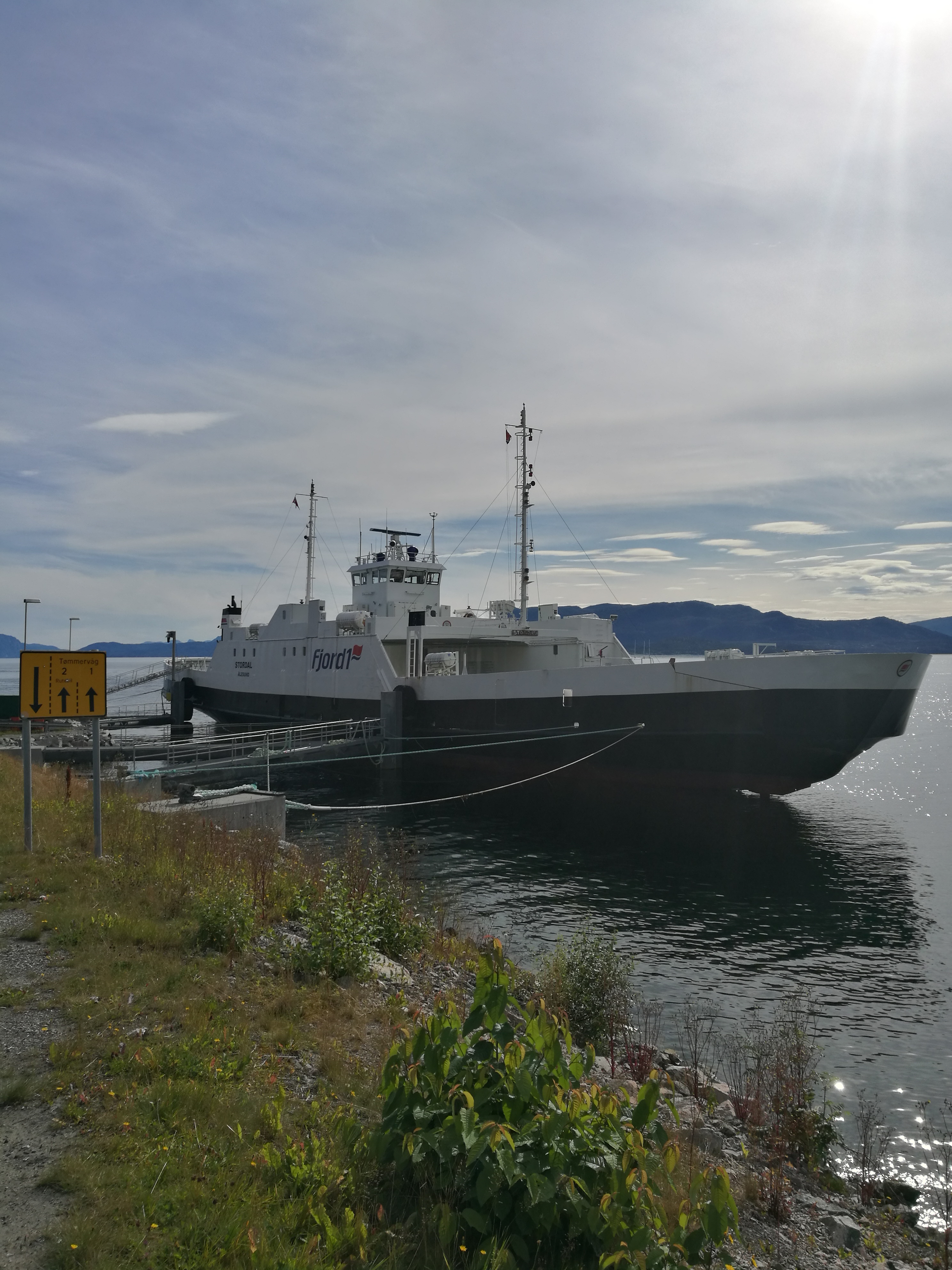 Fjord1 MF «Stordal» tidligere MF «Seimstrand» 1979-1993 ved fergeleie Seivika i Kristiansund.